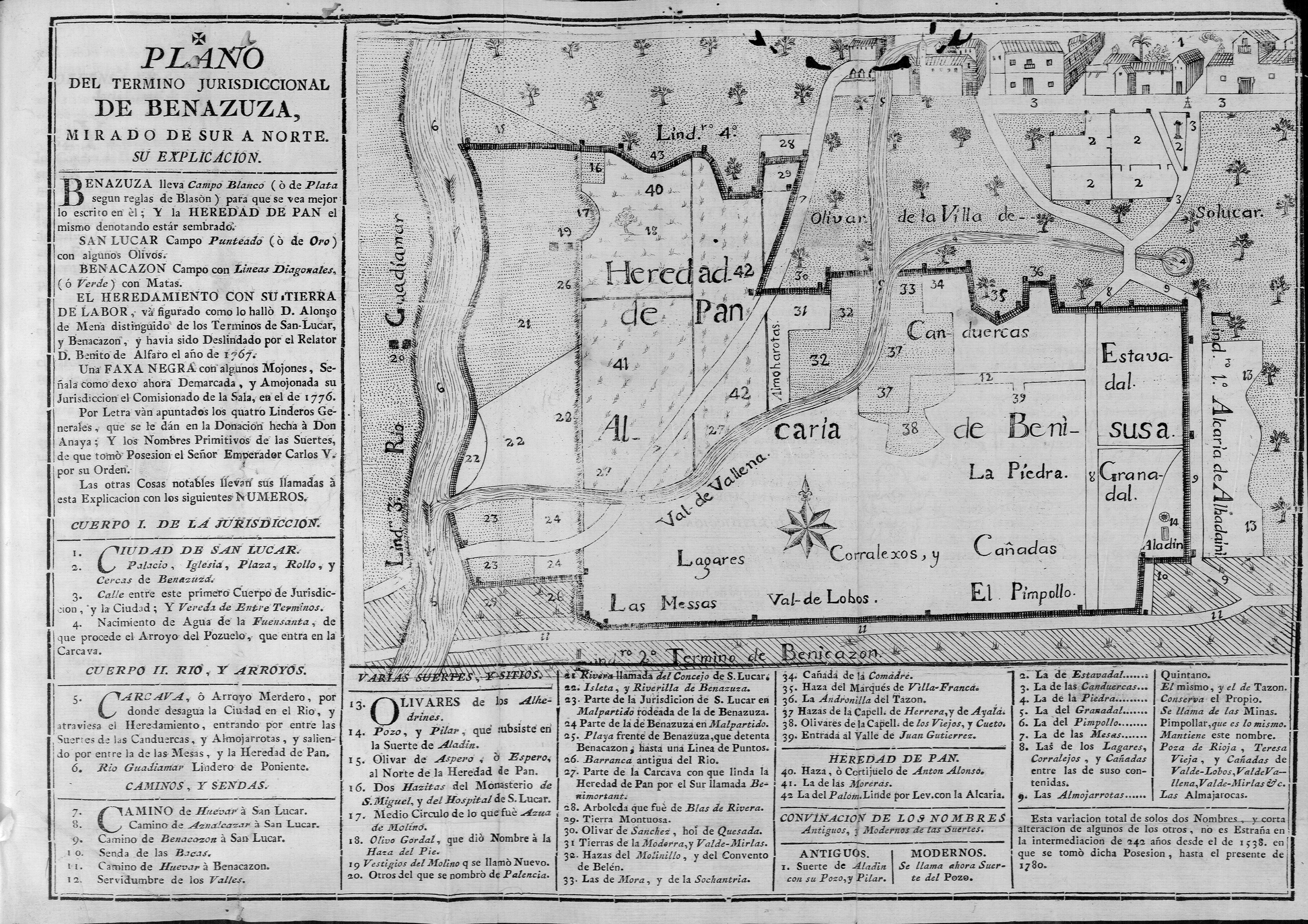 Plano esquemático de la Hacienda Benazuza en Sanlúcar la Mayor (Sevilla)